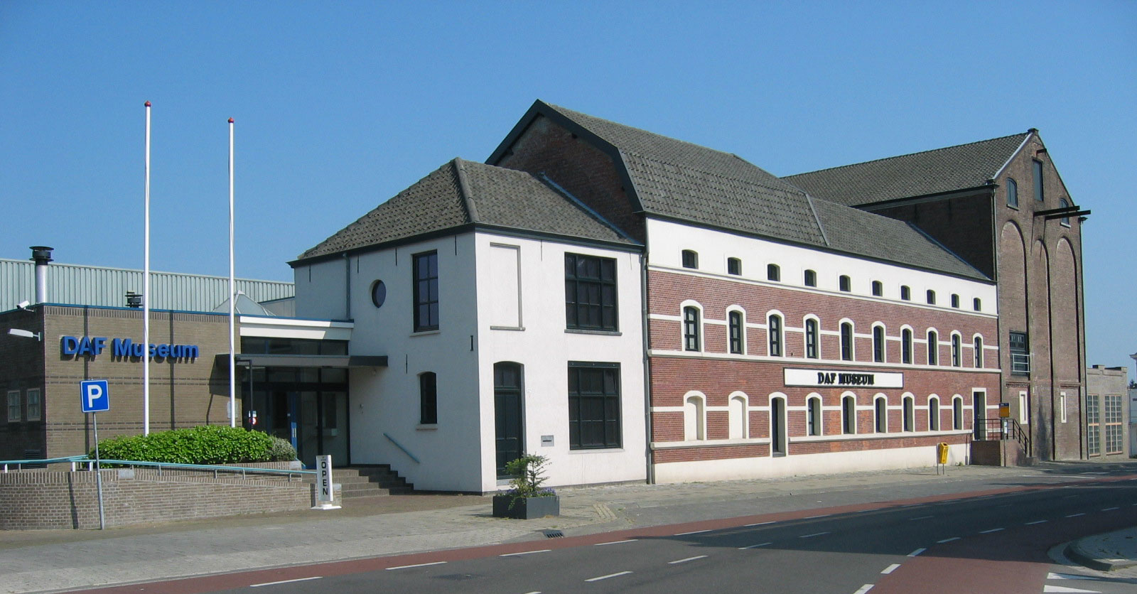 Daf Museum, Eindhoven, The Netherlands